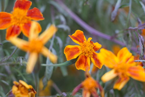 fleur de tagétes tenufolia dans un jardin de ain sefra